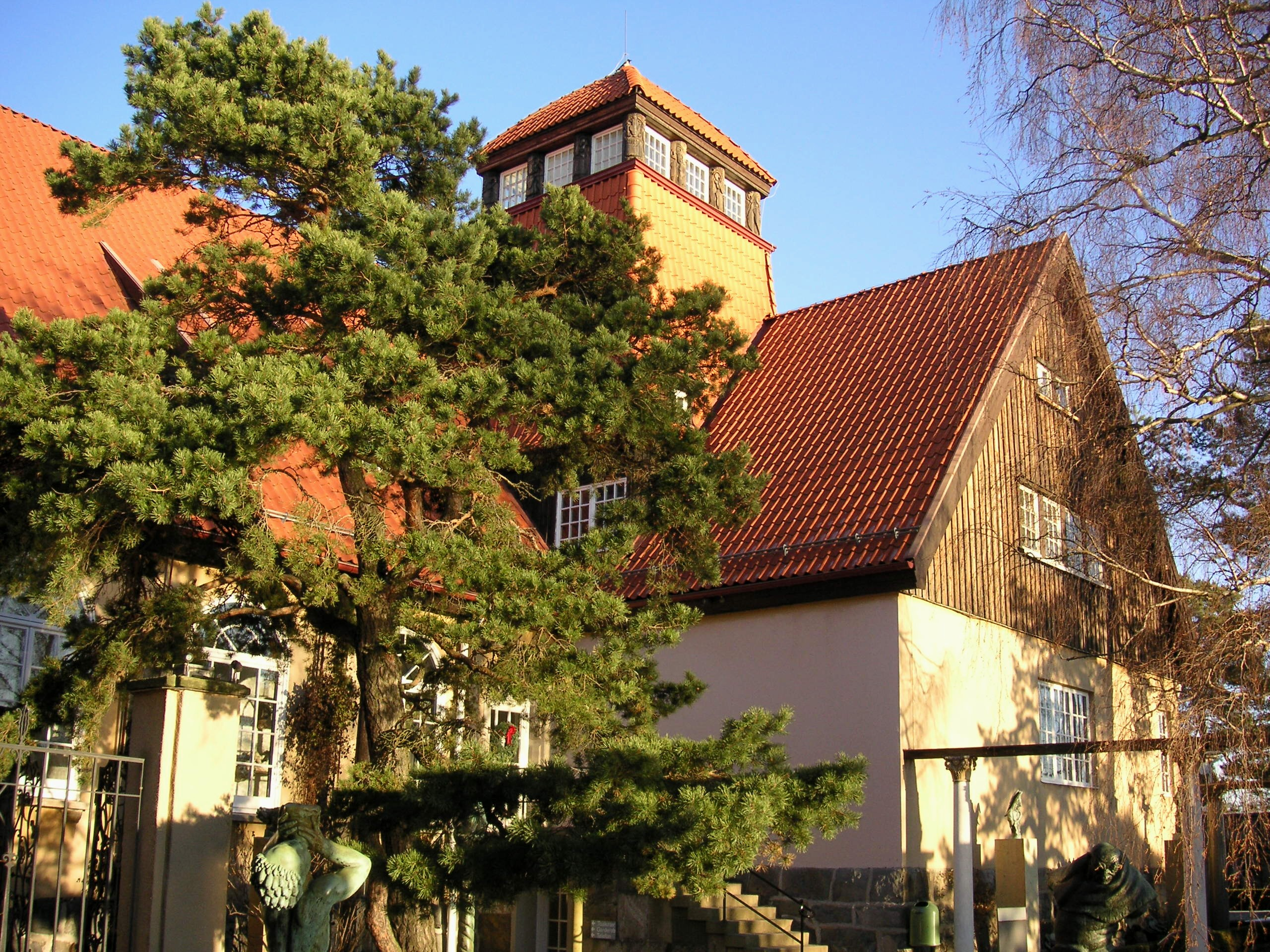 Millesgården huvudbyggnad